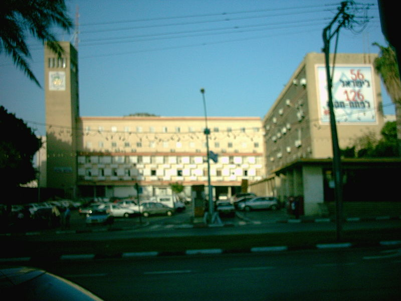 עיריית פתח תקווה: צילמתי היום.